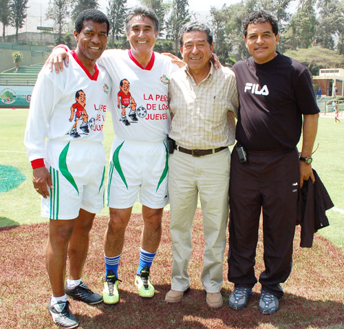 Glorias del Fútbol Peruano. En la Foto de izquiera a derecha Julio César Uribe, Percy Rojas, Dr. Jorge Alva Flroes y (JJ) Juan José Oré.